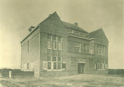 Anoniem. Vakantiehuis De Vonk, Noordwijkerhout. Afkomstig uit De Stijl, 2e jaargang, nummer 1 (november 1918). Auteur onbekend, dus auterursrecht op 1-1-1989 verlopen.